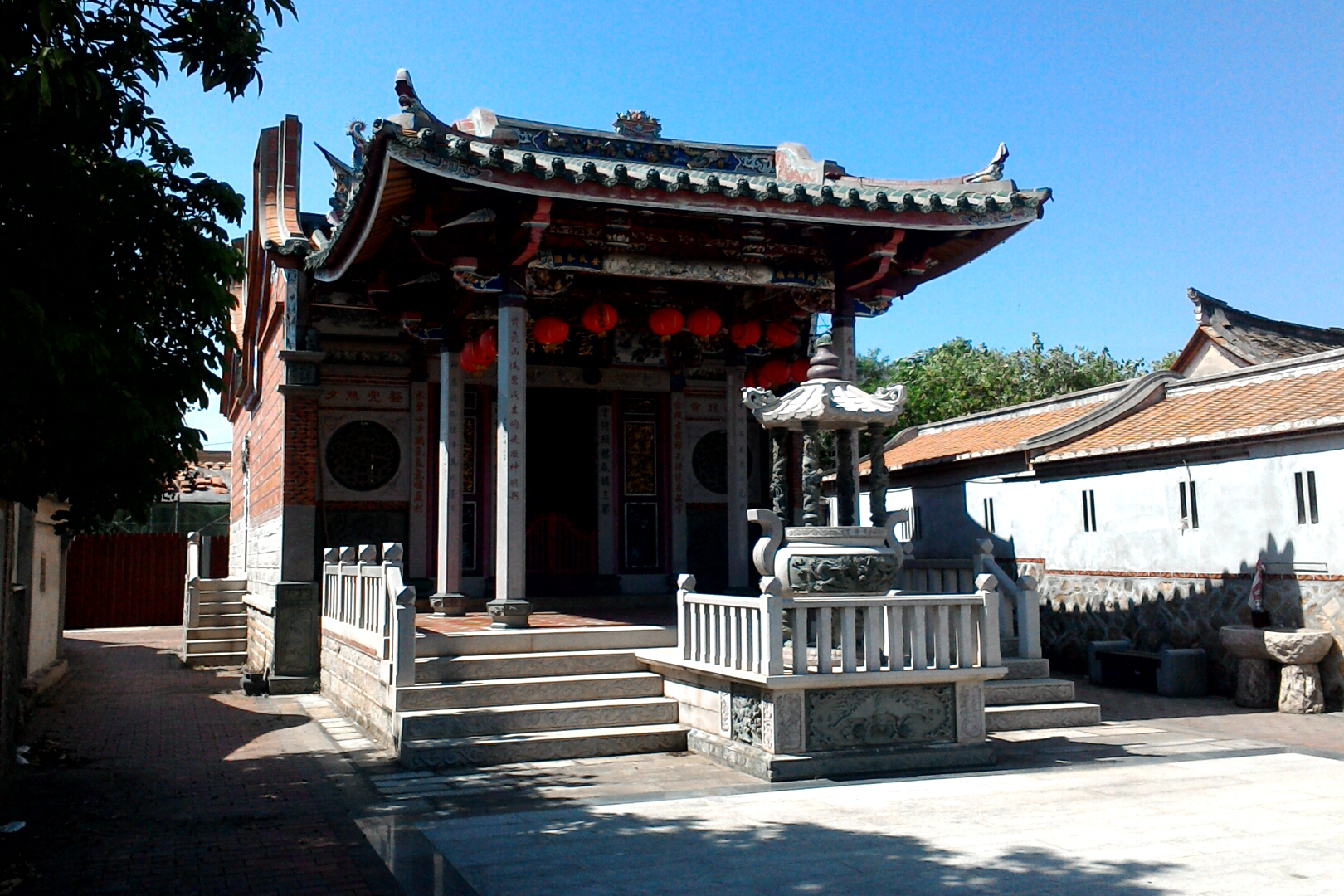 靈濟宮,福建省金門縣金城鎮金水里